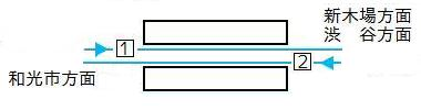 氷川台駅 配線略図